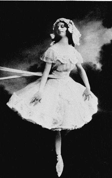 Anna Pavlova dans le rôle de Lise de "La fille mal gardée"